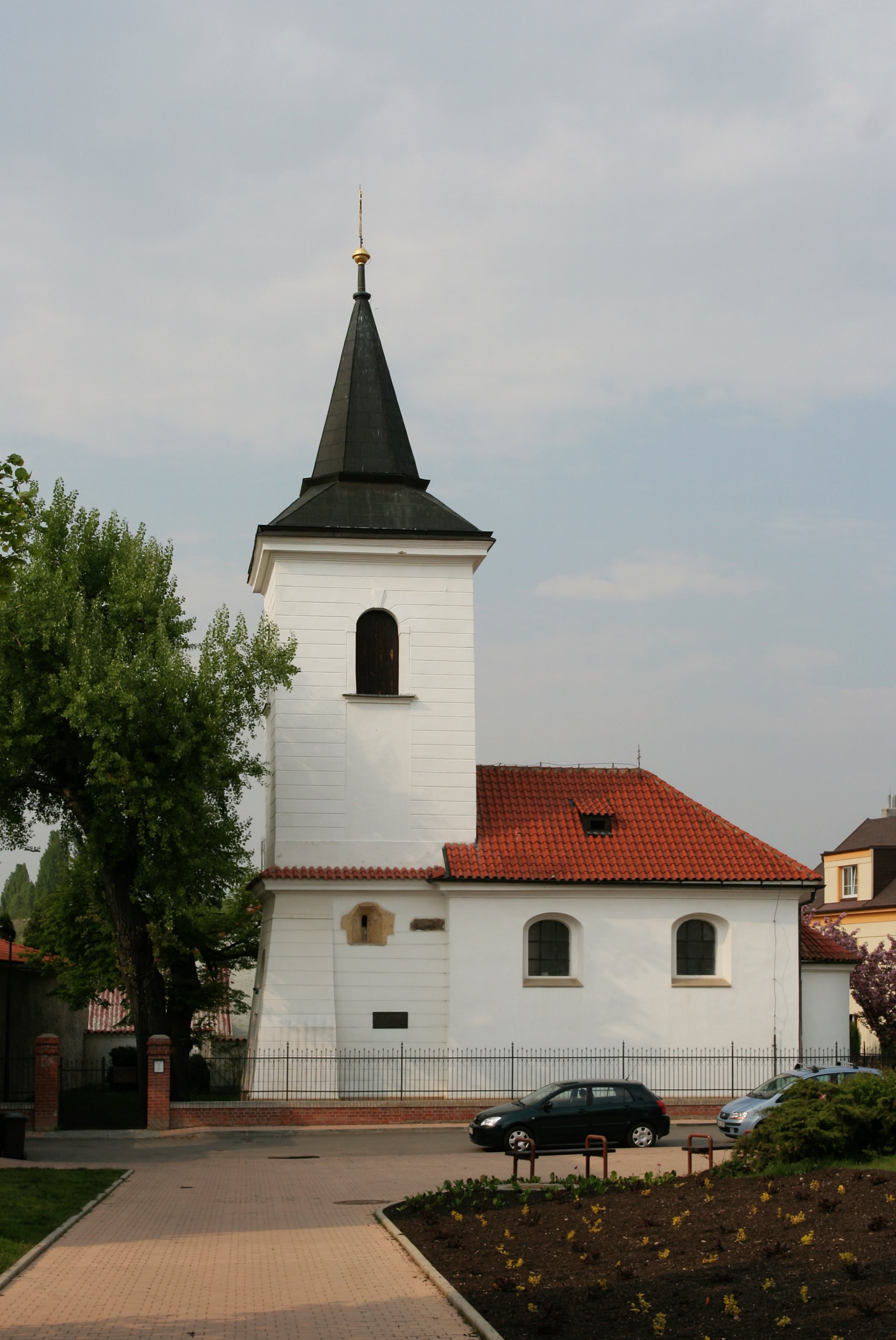 Kostel Svaté rodiny / sv. Martina, Praha Řepy